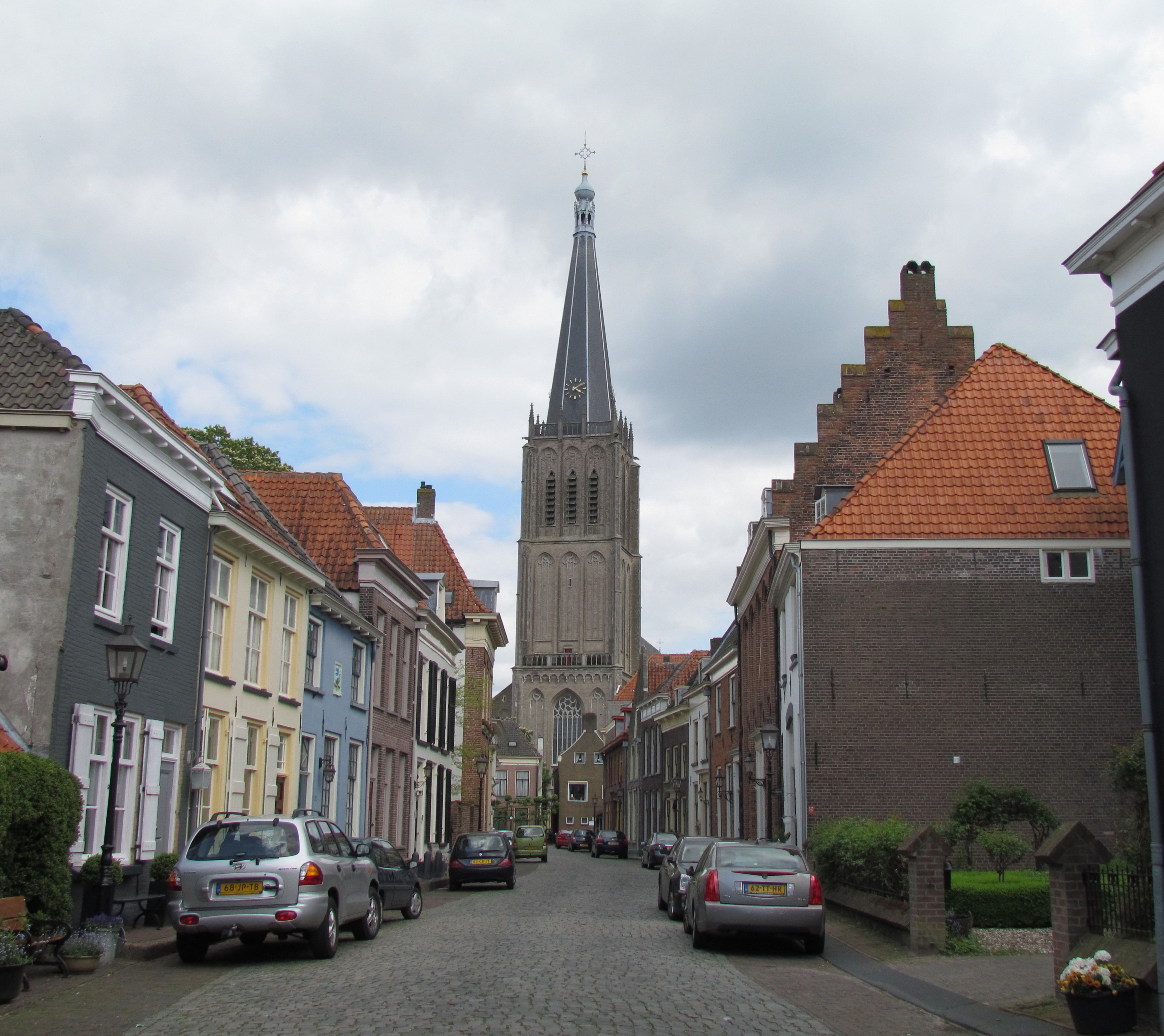 Veerpoortstraat en Grote of Martinikerk in Doesburg (NL)